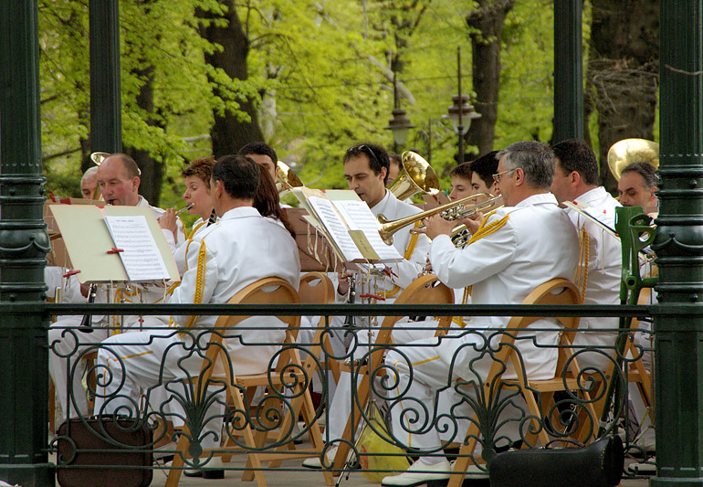 Le parc Kalemegdan, Belgrade, Serbie